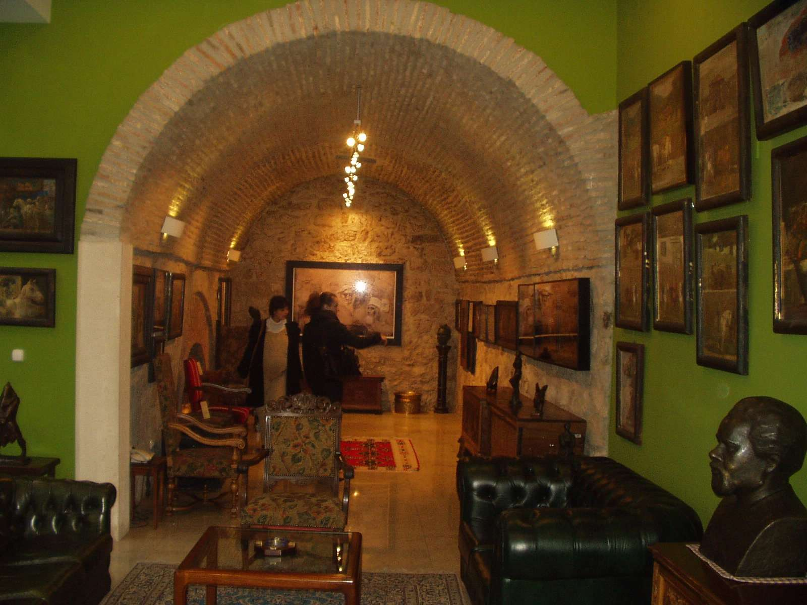 Berberov salon 3